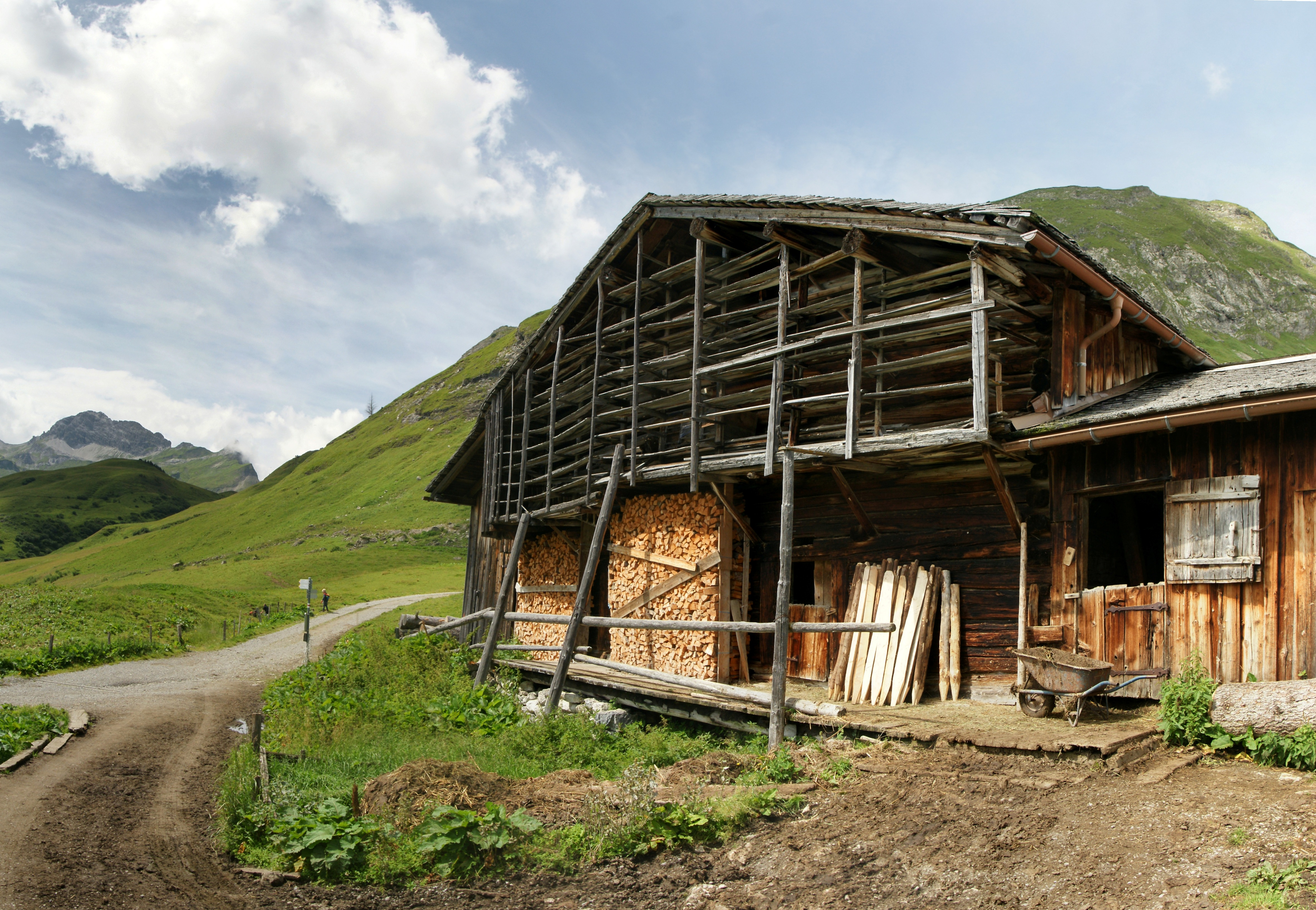 Stall und Trockenlaube zum Haus Schönenberg 11 in der Siedlung Bürstegg. Das Gelege diente zum trocknen des gestochenen Torf, der zum Heizen benötigt wurde, nachdem kein Holz zur Verfügung stand.